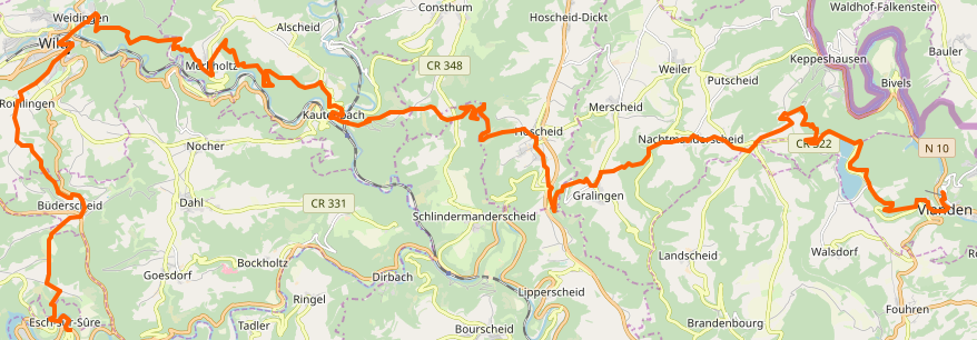 Streck vum Charles-Mathieu-Pad